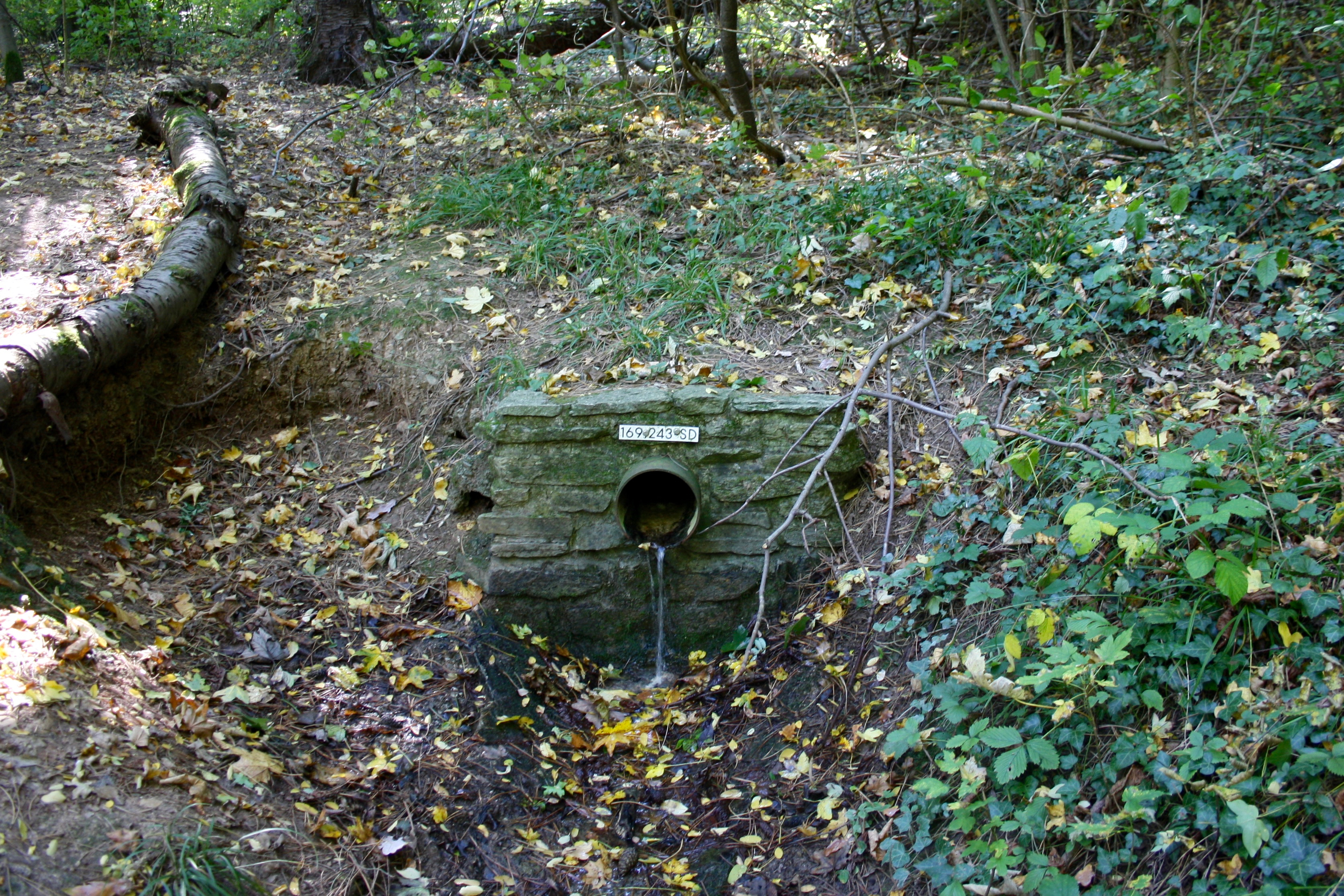 Quelle des Knotzenbachs im Maurer Wald in Wien.